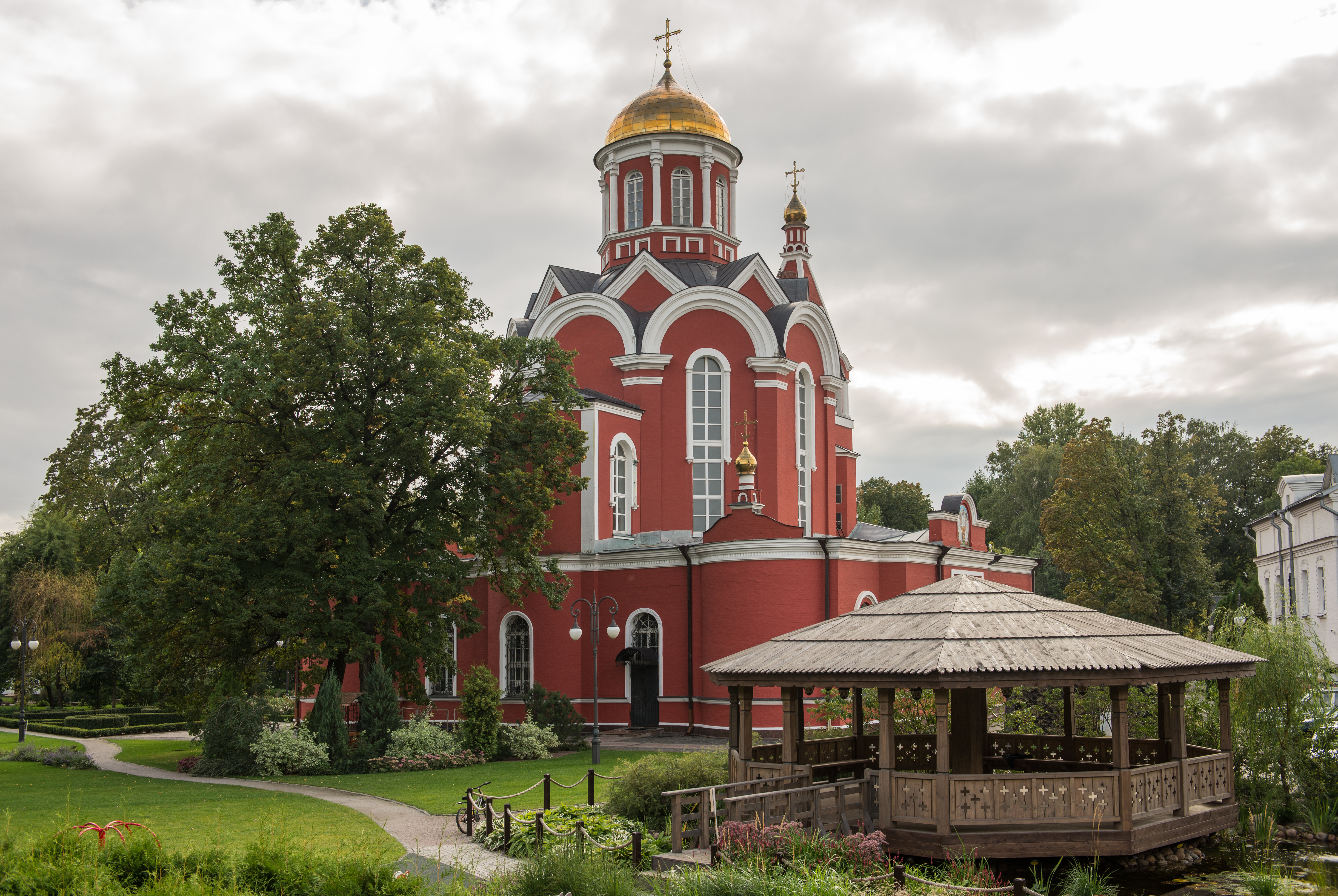 Церковь Благовещения в Петровском парке: Красноармейская ул., дом 2А, Аэропорт, Северный округ, Москва